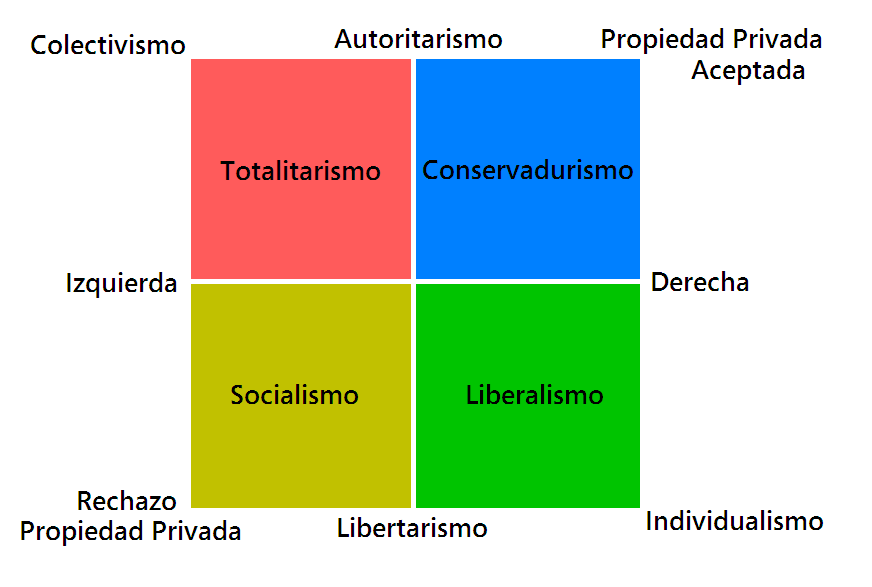 Mapa político que muestra los cuatro grandes sistemas políticos.